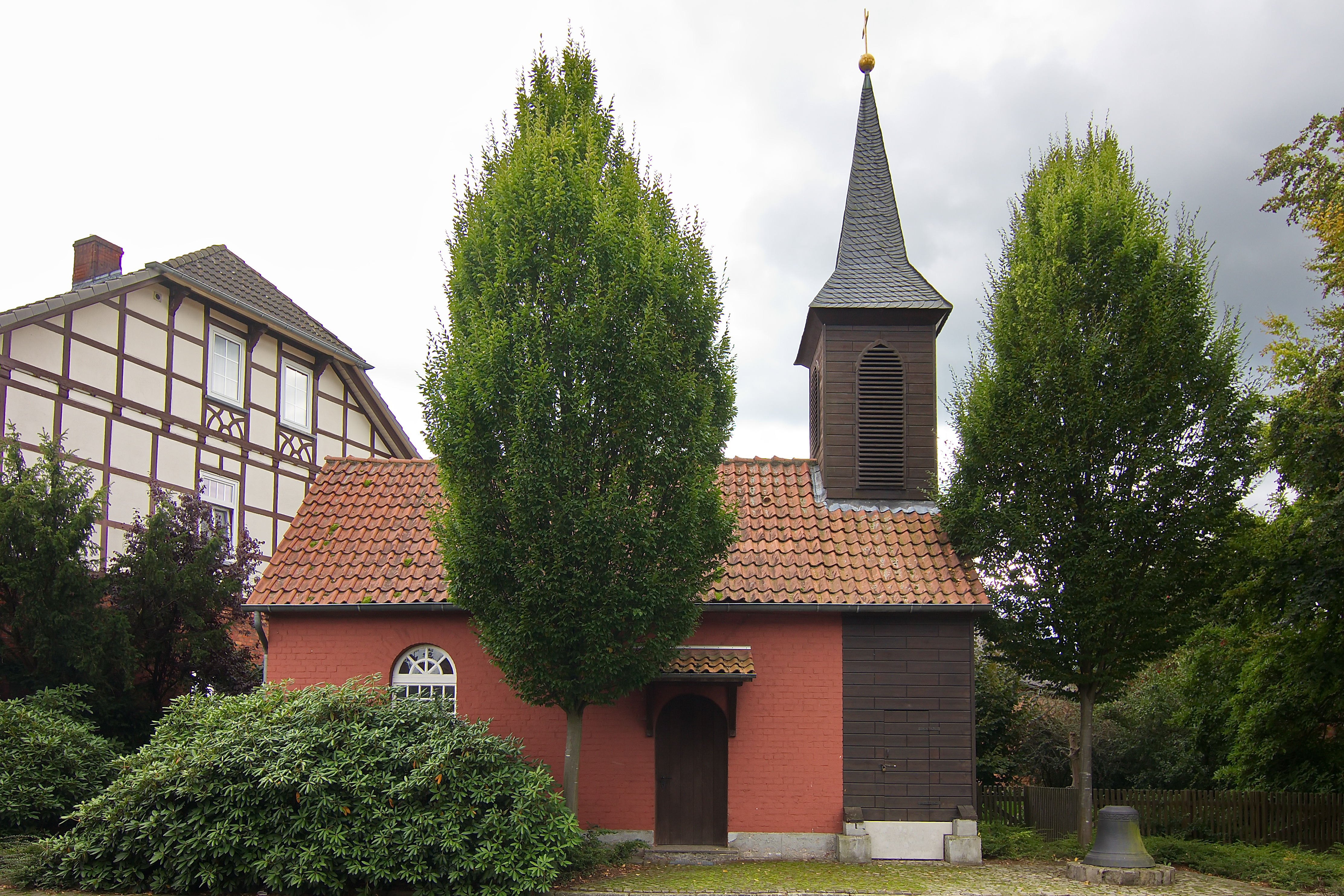 Die Dreikönigskapelle in Suderwittingen (Wittingen) findet 1537 erste Erwähnung